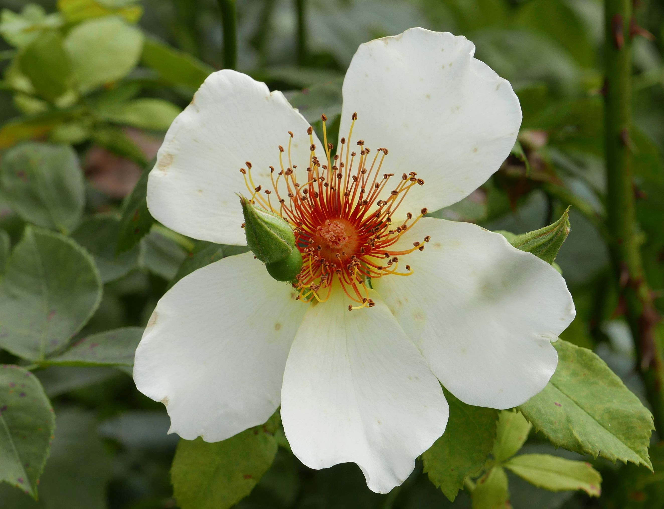 Rosa 'Golden Wings' Shepherd 1956, Rosarium Sangerhausen, August 2017